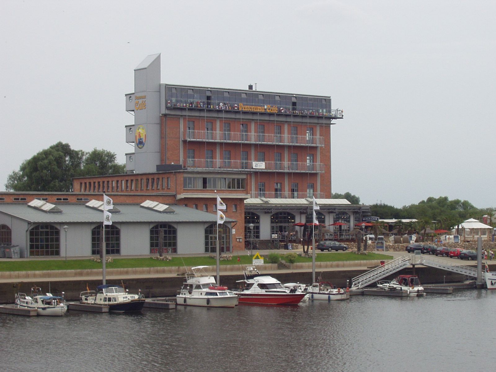 Dömitz, Germany. Marina.